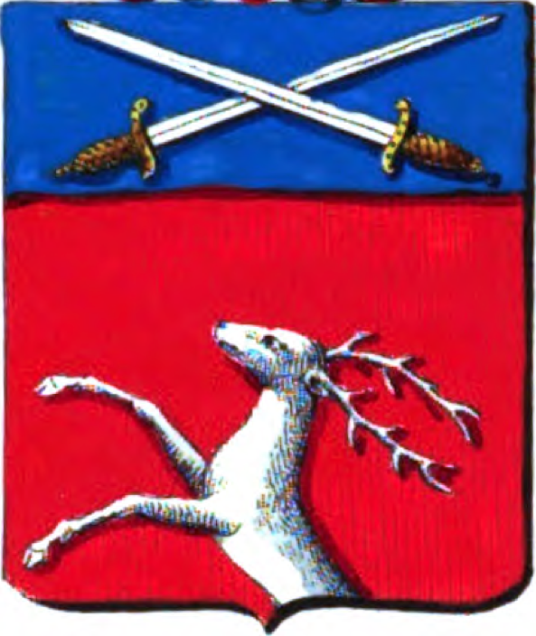 Van keel, met een uitkomend hert van zilver, het schildhoofd aangezet van azuur, beladen met twee degens van zilver, met gevest van goud, schuingekruist, de punten omhoog.